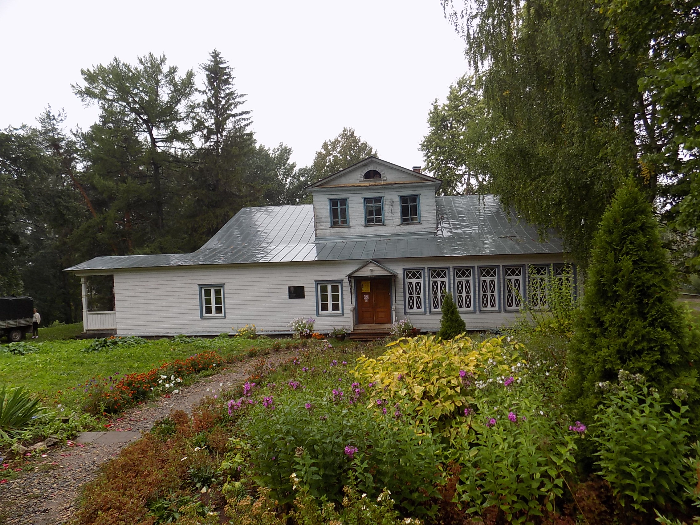 Дом, в котором жили лесоводы Теплоуховы А.Е. и Ф.А.: улица Теплоухова, 40 / улица Ленина, 10, Ильинский, Ильинский район, Пермский край